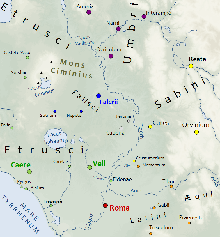 Les Falisques au milieu du Ve siècle avant JC